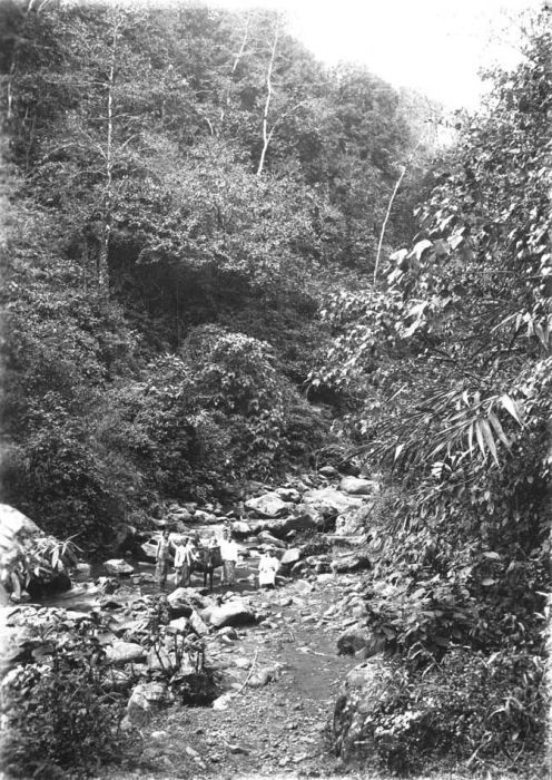 Foto. De Sariwanirivier bij Soekapoera, Java